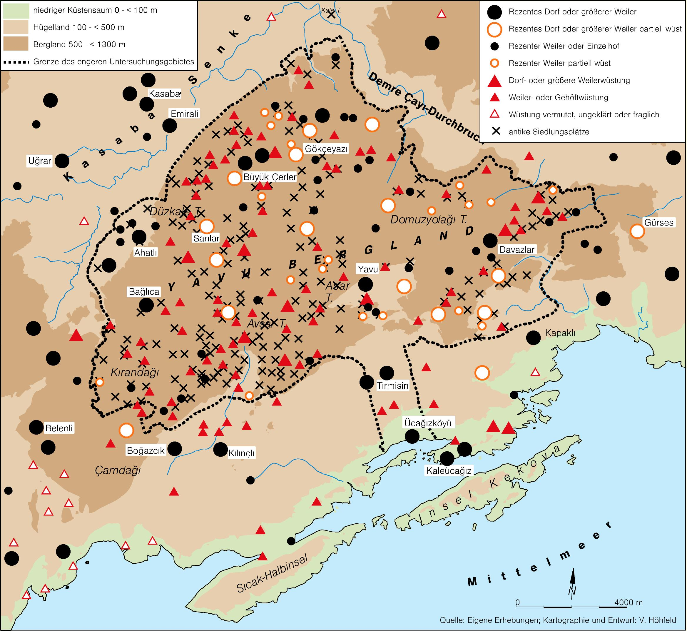 Überall inmitten der Macchie des Yavu-Berglandes stößt man auf Reste antiker Stätten: Hier die Ruinen der antiken Siedlung Apollonia, in lykischer Zeit ein Herrensitz, der zusammen mit Aperlai, Isinda und Simena mit einer Stimme im lykischen Bund vertreten